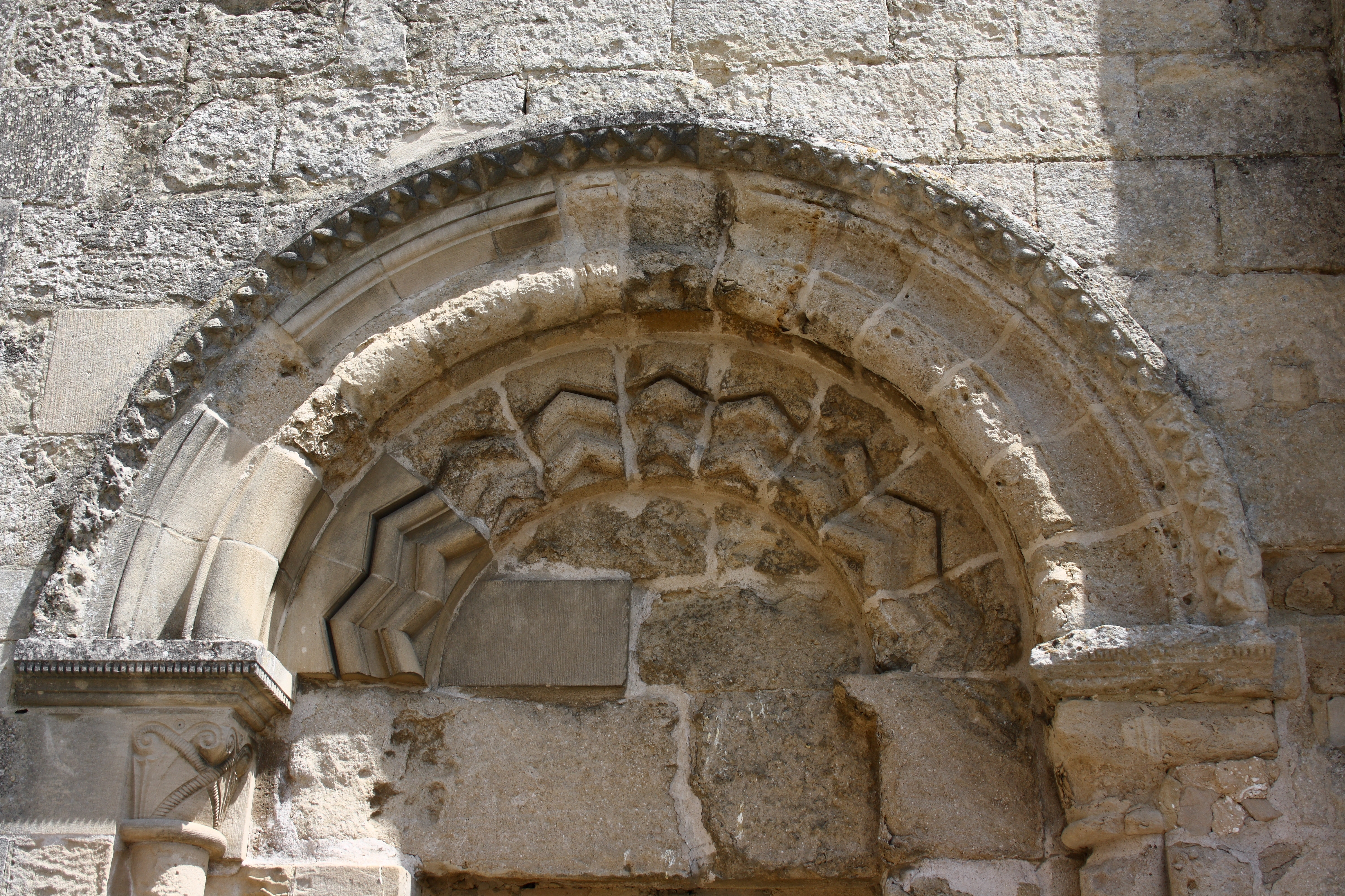 katholische Kirche Saint-Sulpice in Santeuil